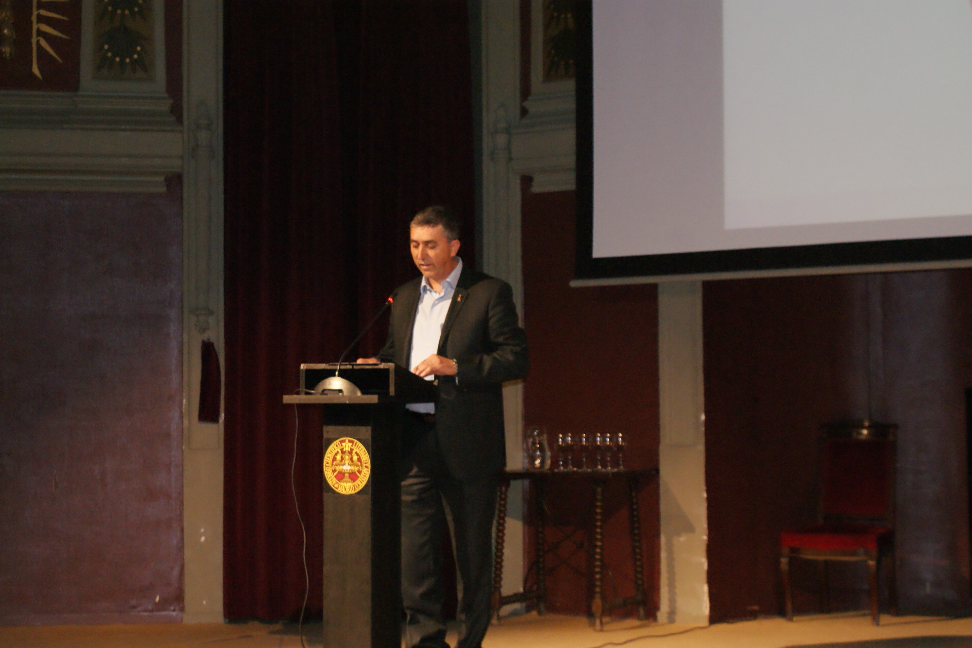 Presentació de Compromís a Madrid